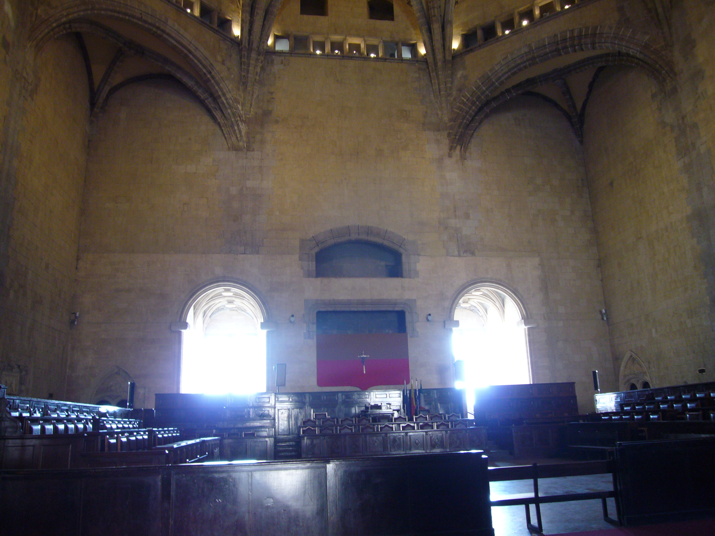 Napoli, Castel nuovo, sala dei Baroni, interno